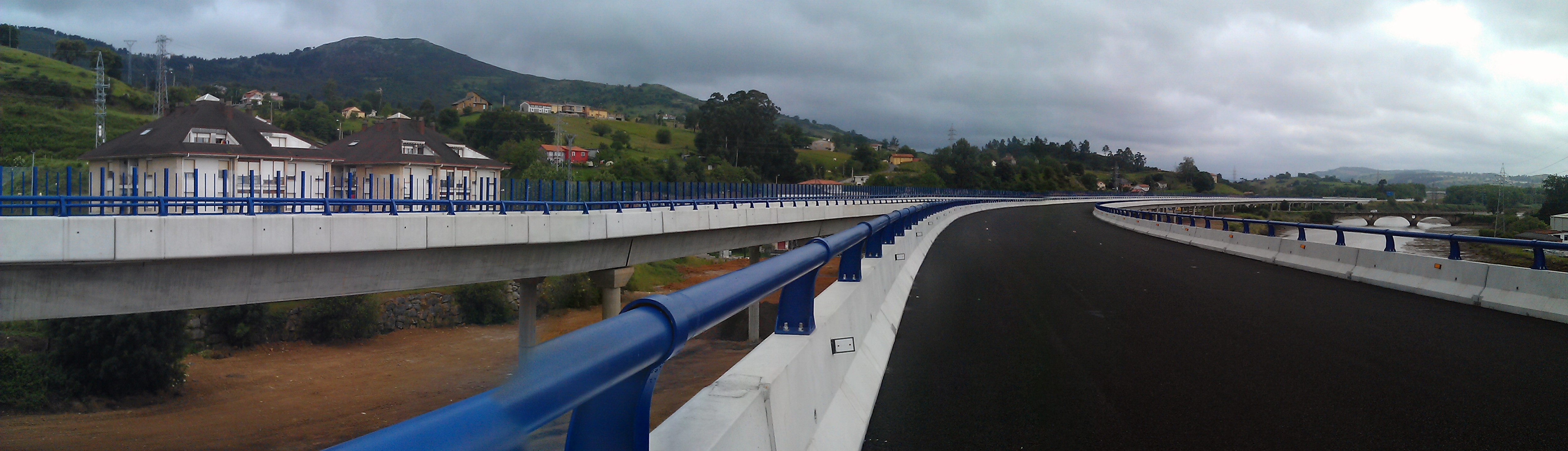 Autovía